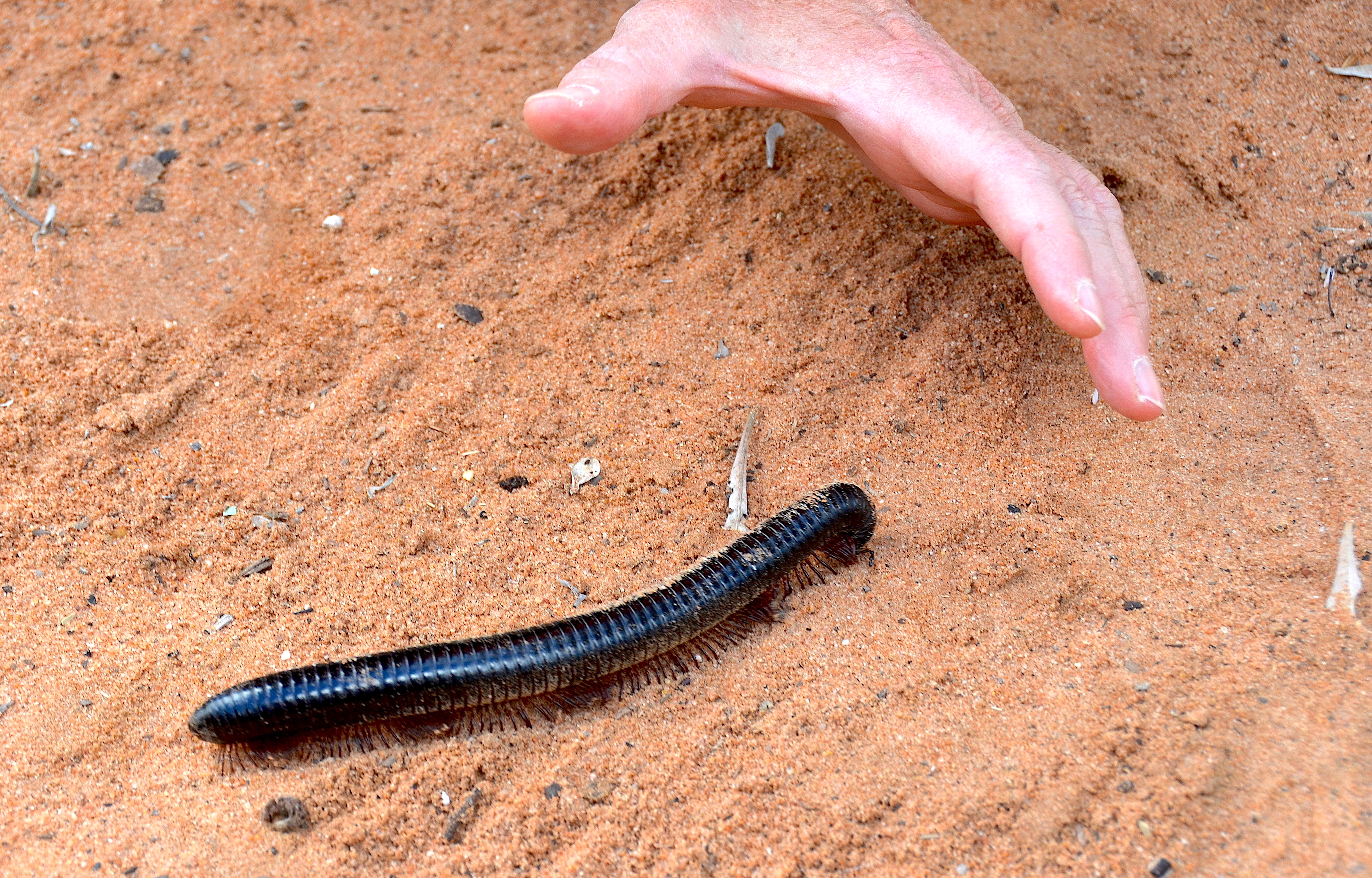 Tausendfüßler in Namibia